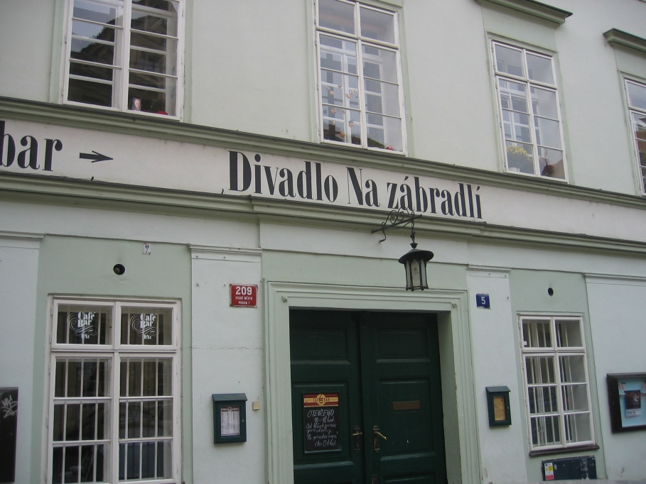 Fotografie Divadla Na zábradlí, autor P. V.